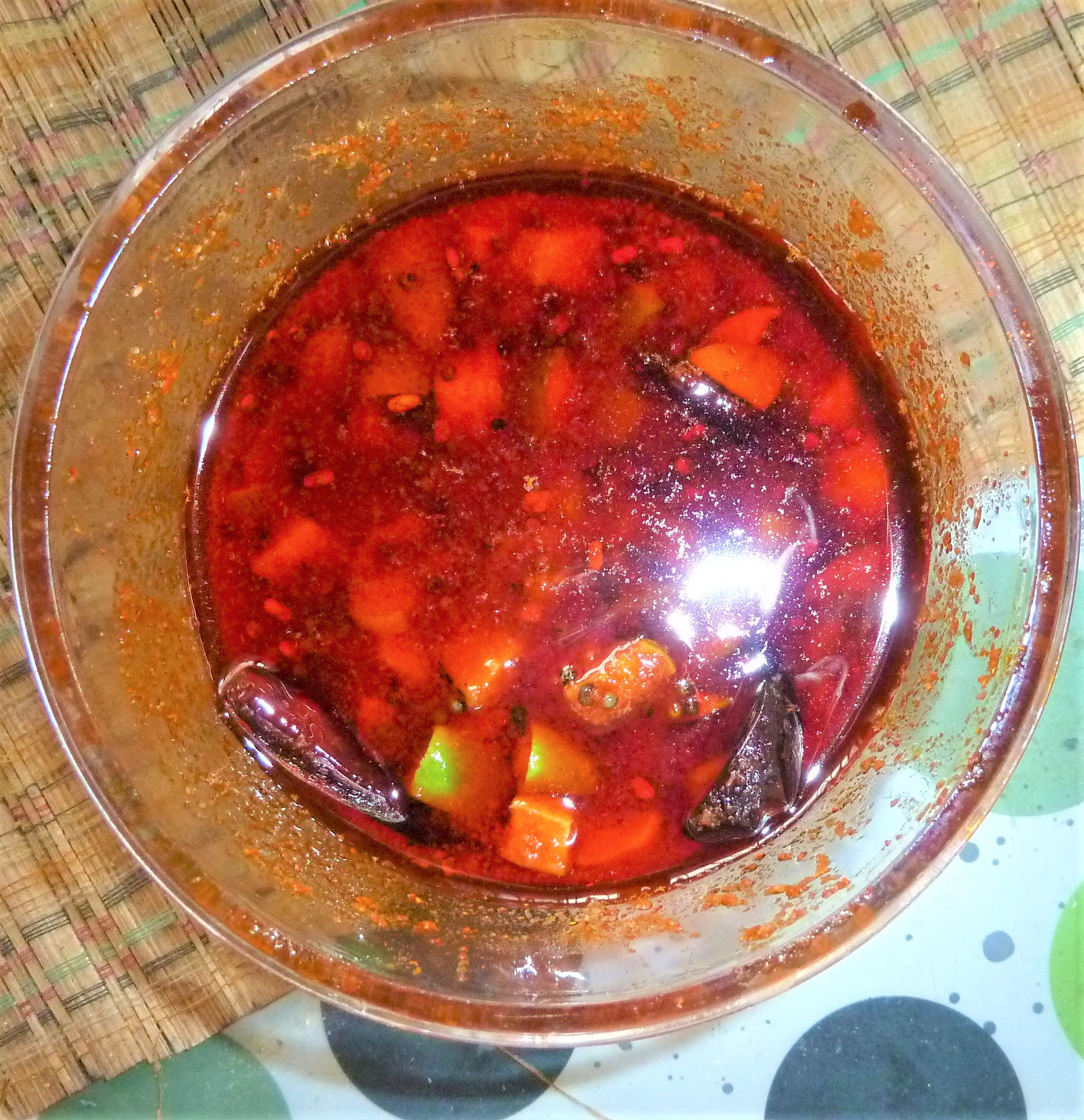 మామిడికాయ ముక్కల పచ్చడి